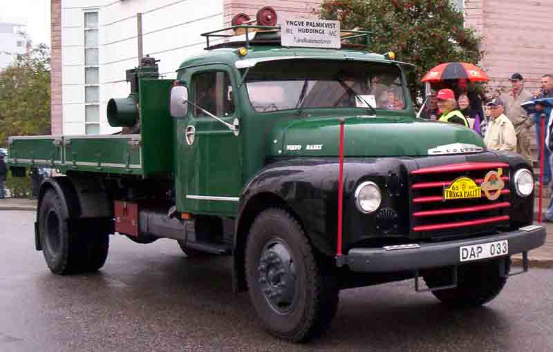 Volvo L 47505 Raske Truck 1965